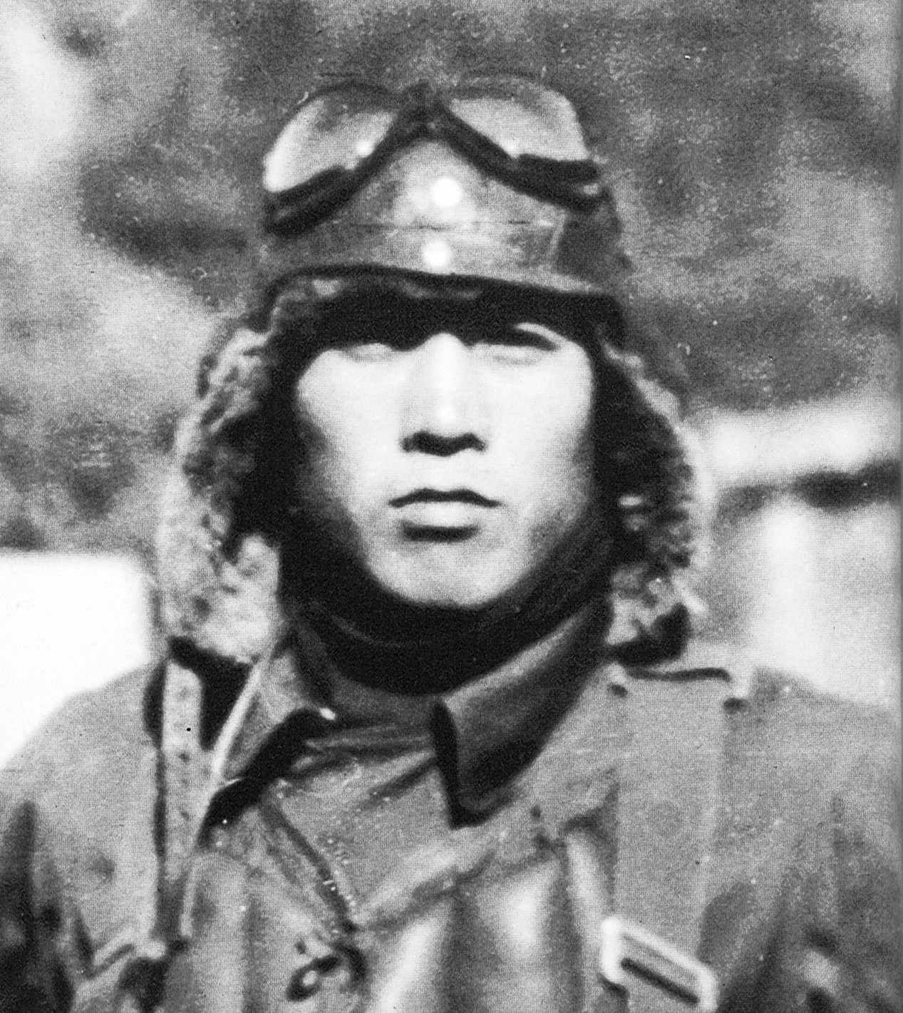 大分空での原田要